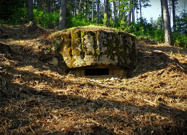 Emplazamiento para arma automática originario de la guerra civil española, situado en el Espacio Histórico Frente del Nalón, Asturias Unknown